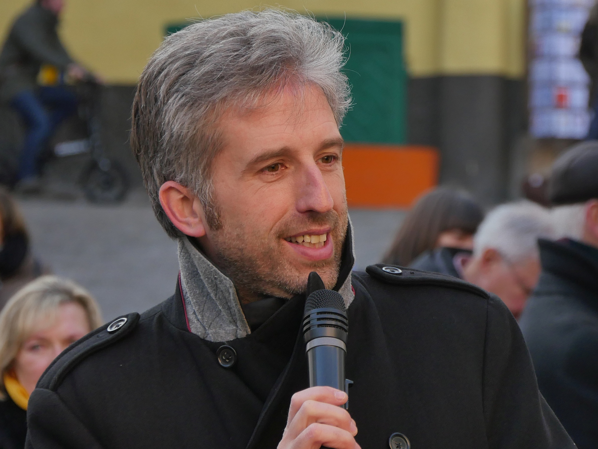 Boris Palmer bei der Eröffnung des Schokoladenfestivals chocolART 2019 in Tübingen